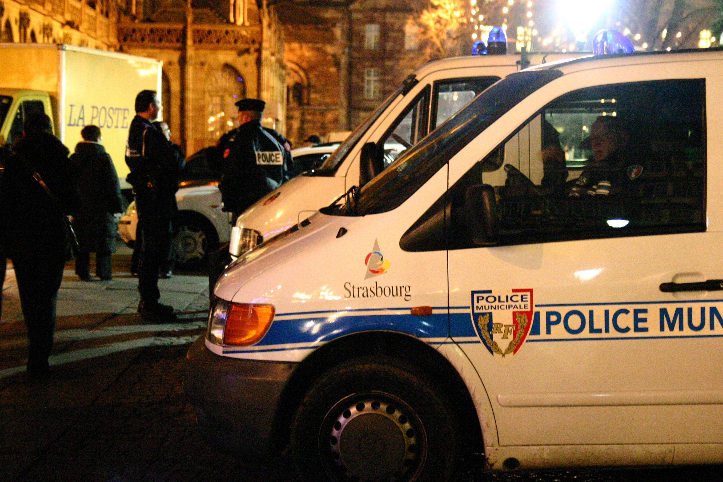 Mercedes-Benz Vito de la police municipale de Strasbourg